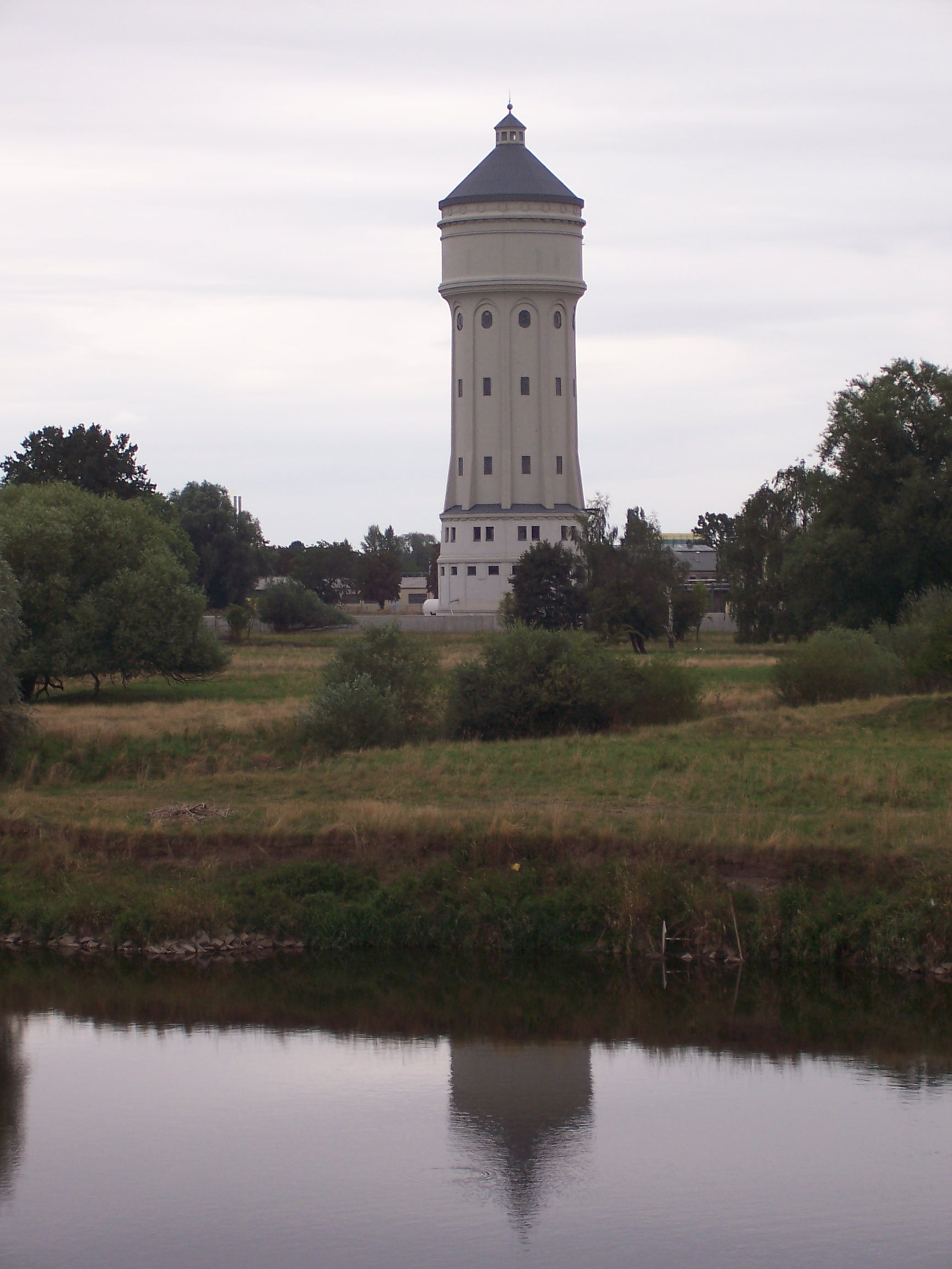 Wasserturm des Eilenburger Chemiewerkes in Eilenburg-Ost, erbaut 1916 in der Bauart Otto Intze von der Firma Dyckerhoff und Widmann AG, Höhe 60,5 Meter